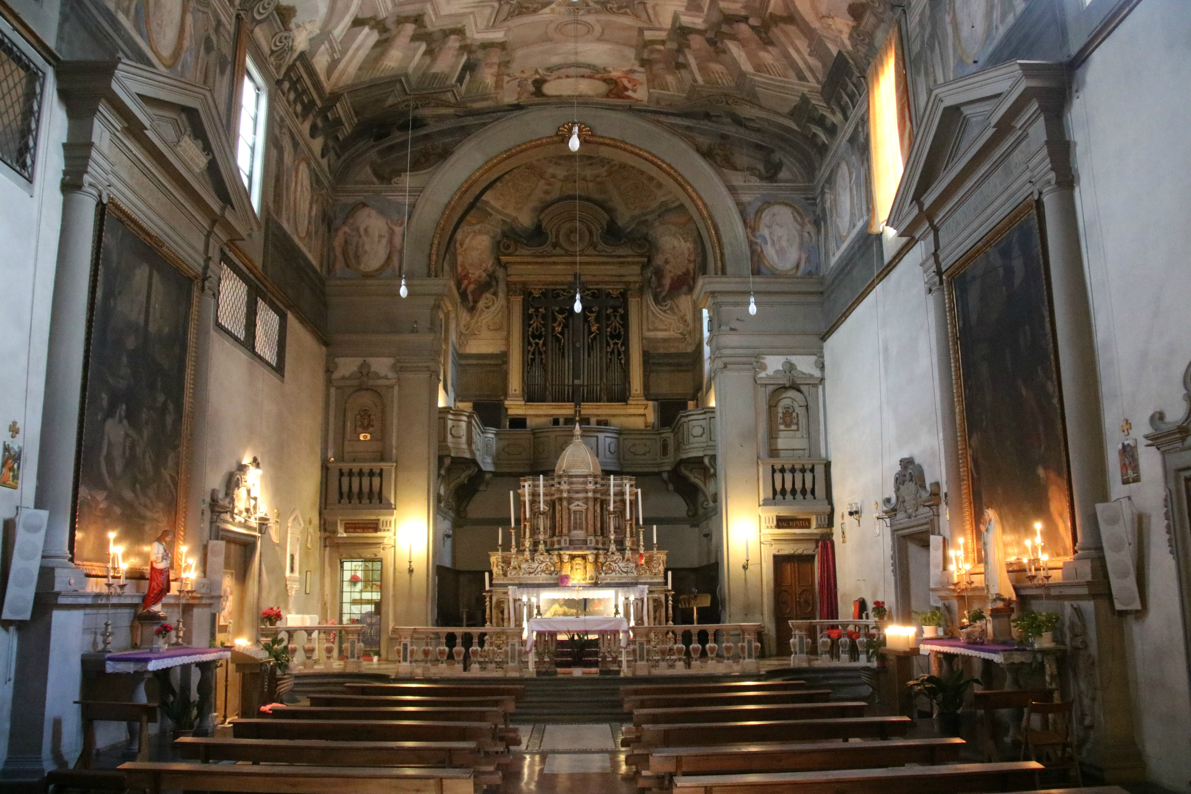 Chiesa di Sant’Egidio, Firenze